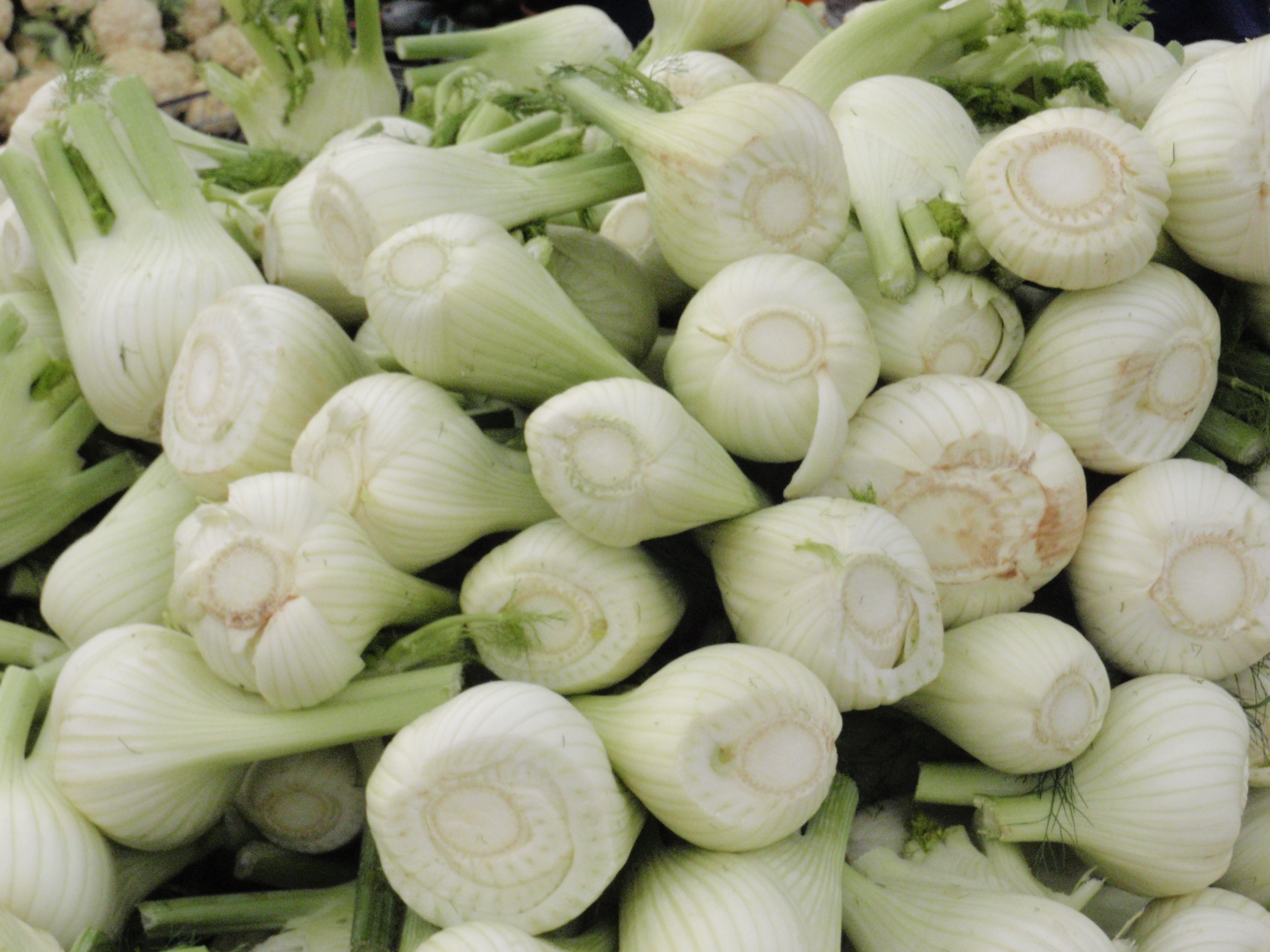 Shuk Hsayarim ירקות בשוק הסיירים Fennel at Sayarim-Market